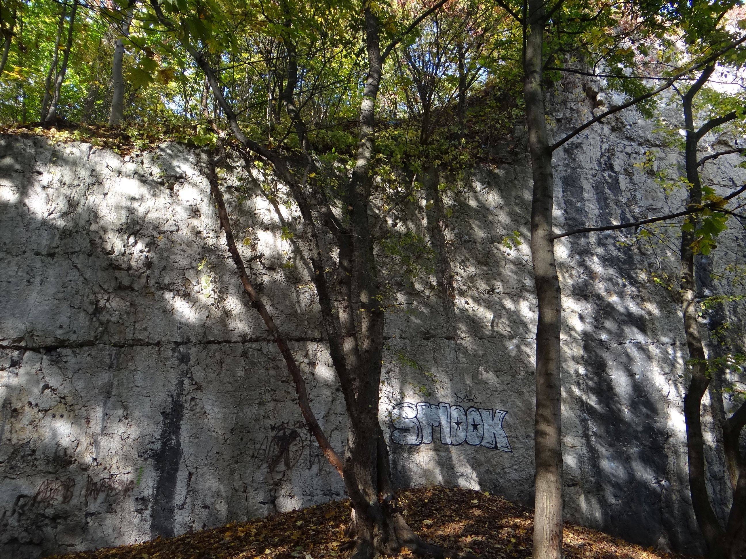 Mur skalny "Esteci" w dawnym kamieniołomie pod św. Benedyktem na Krzemionkach Podgórskich w Krakowie